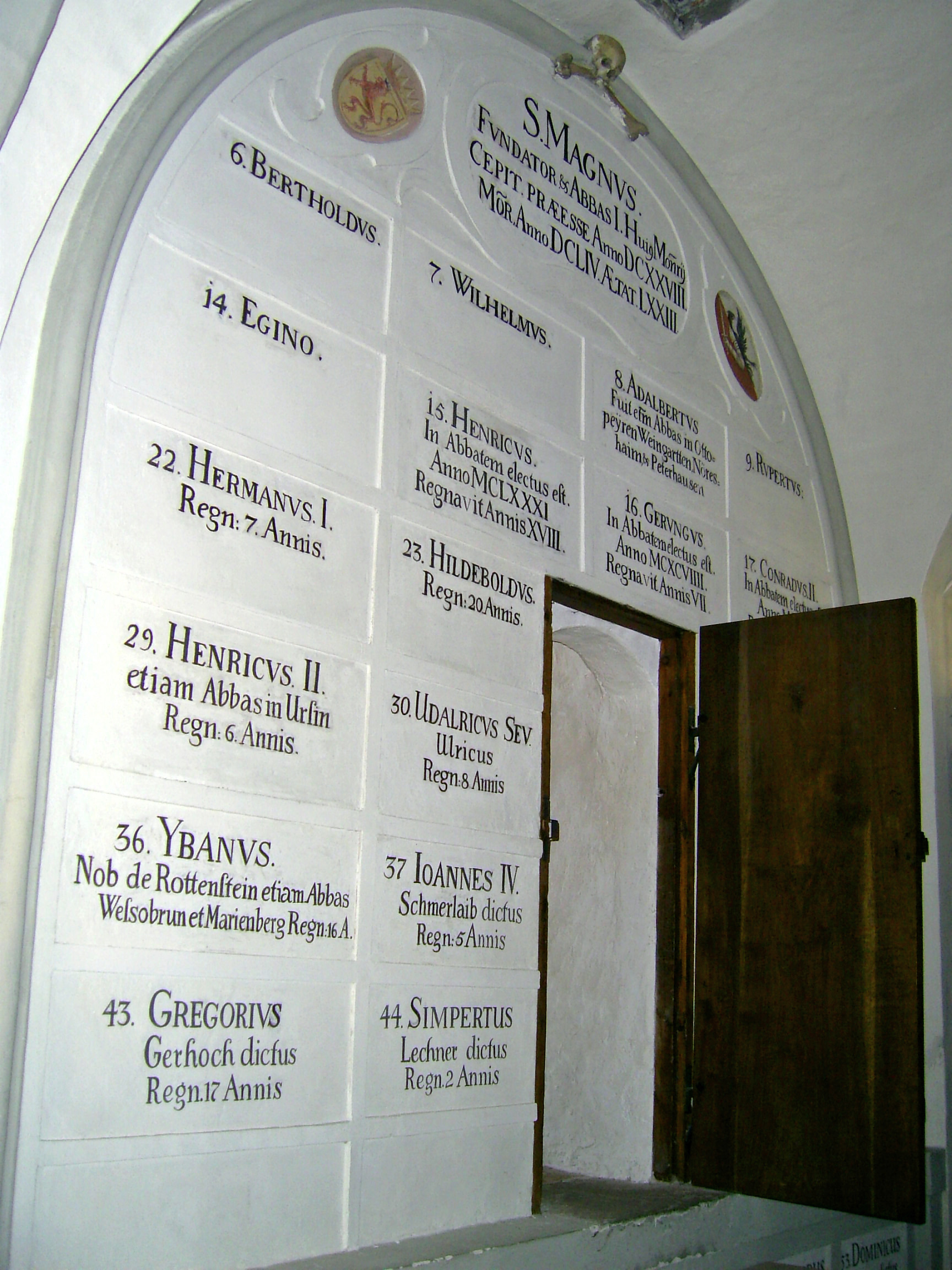 Äbte Liste St Mang Krypte 1